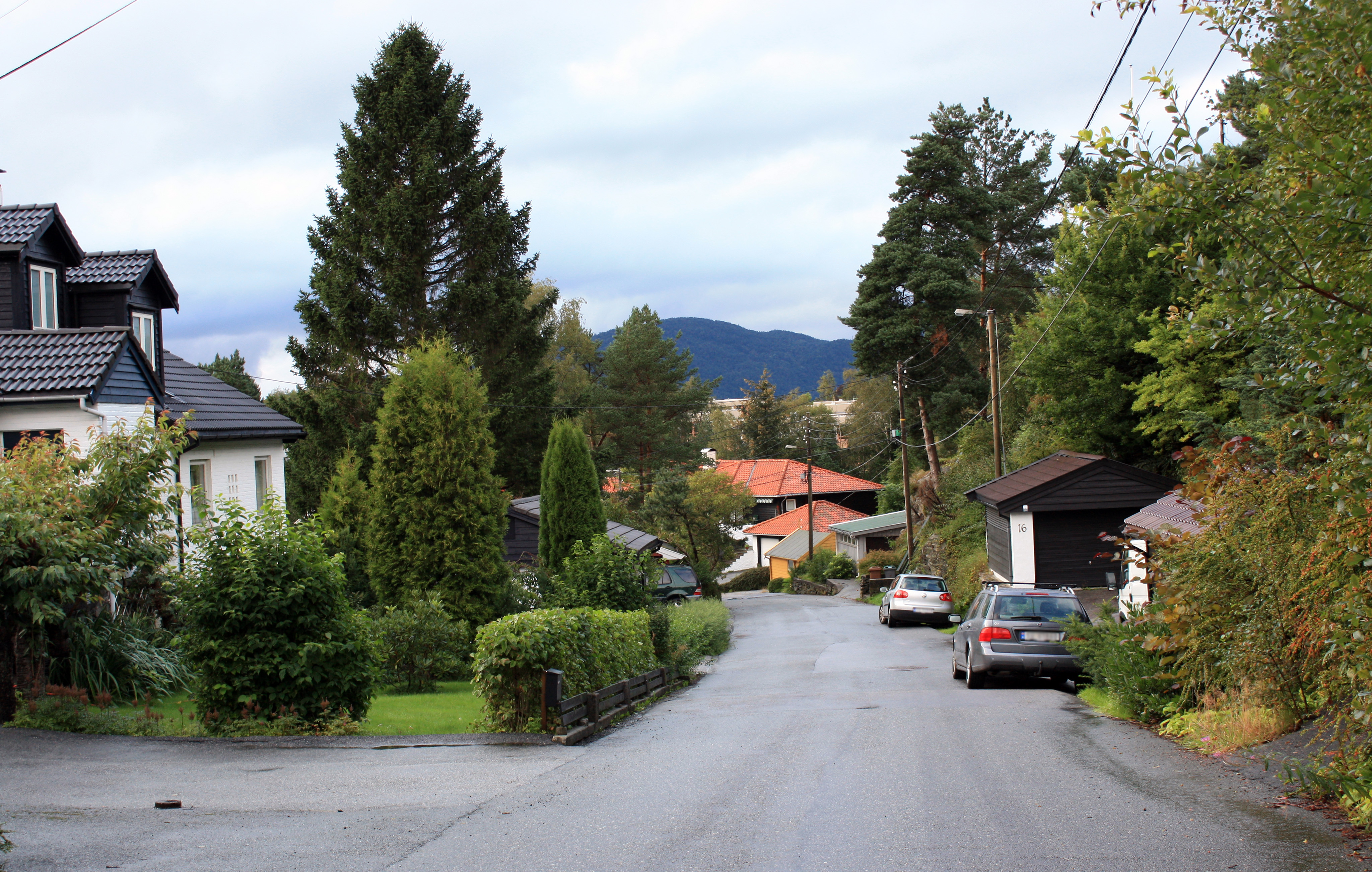 Dyrhaugen, Fana, Bergen.